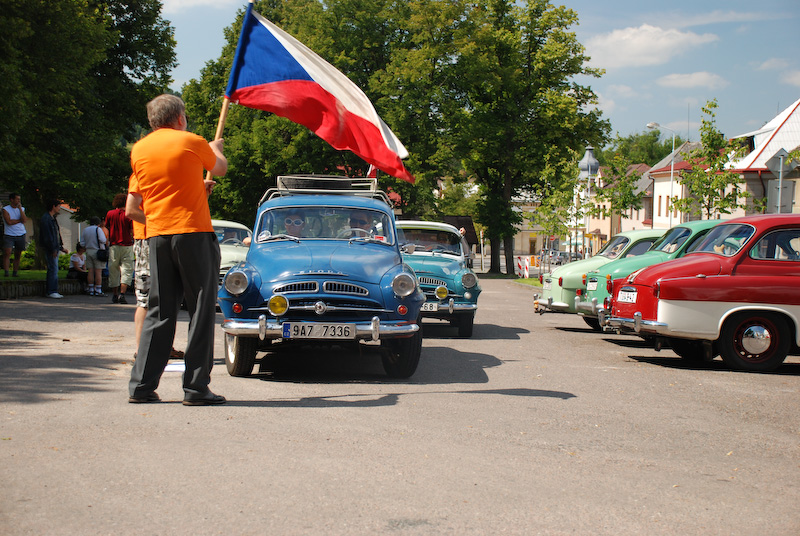 Sraz vozů Škoda Spartak v Trhové Kamenici